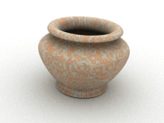 Demonstratie 3D renderen, global illumination. Gemaakt met open source programma (Art Of Illusion), eigen ontwerp, public domain